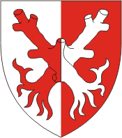 Wappen von Essertines-sur-Yverdon Kanton Waadt Schweiz